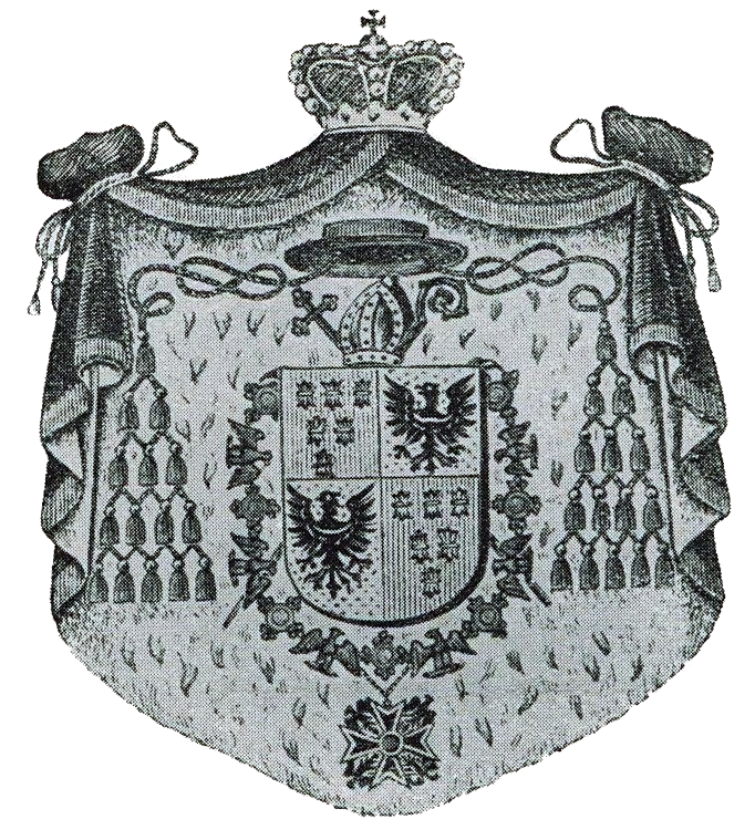 Wappen von Georg Kardinal Kopp, Fürstbischof von Breslau